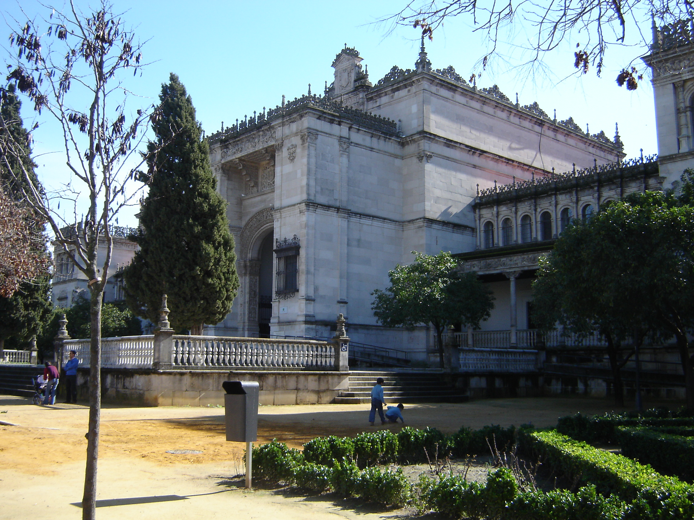 Museo Arqueológico (Plaza de América), en el Parque de María Luisa (Sevilla). Visto desde un lateral. Realización propia.